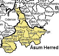 Åsum Herred Odense Amt, Denmark. Map by Svend-Erik Christiansen, edited by user:Nico-dk .